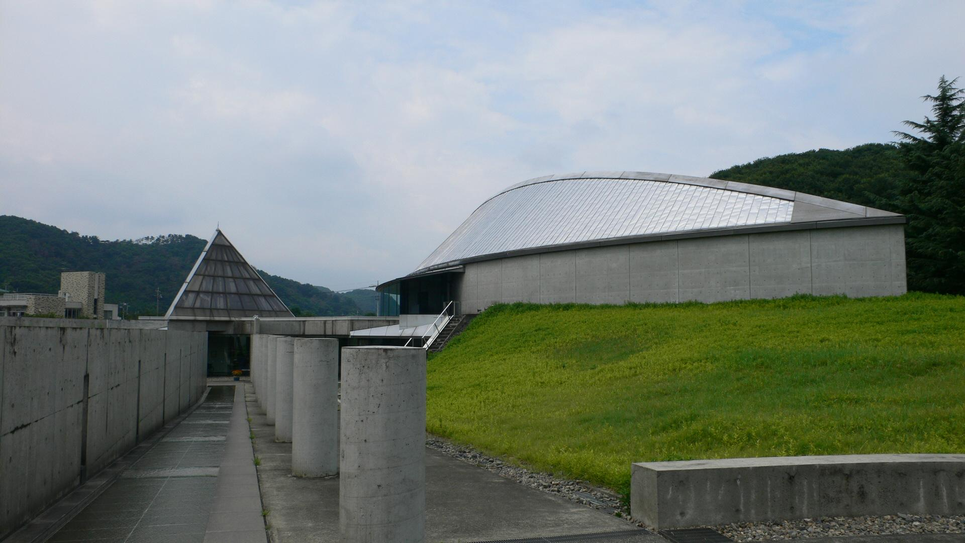 Kasakakeno Iwajuku Bunka Shiryokan(Iwajuku Museum) about paleolithic ruins -Iwajuku